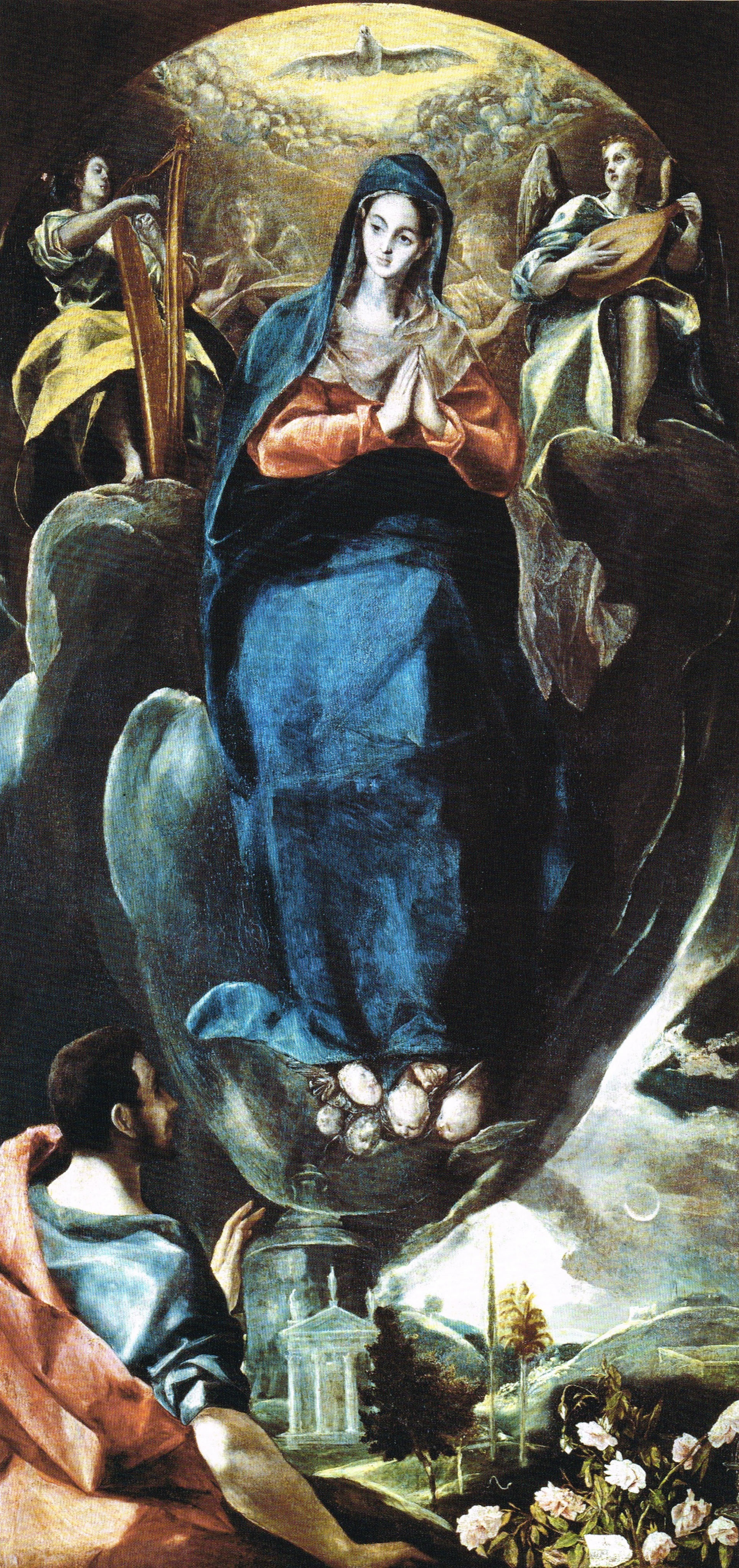 La obra representa a la Inmaculada Concepción siendo contemplada por San Juan Evangelista.